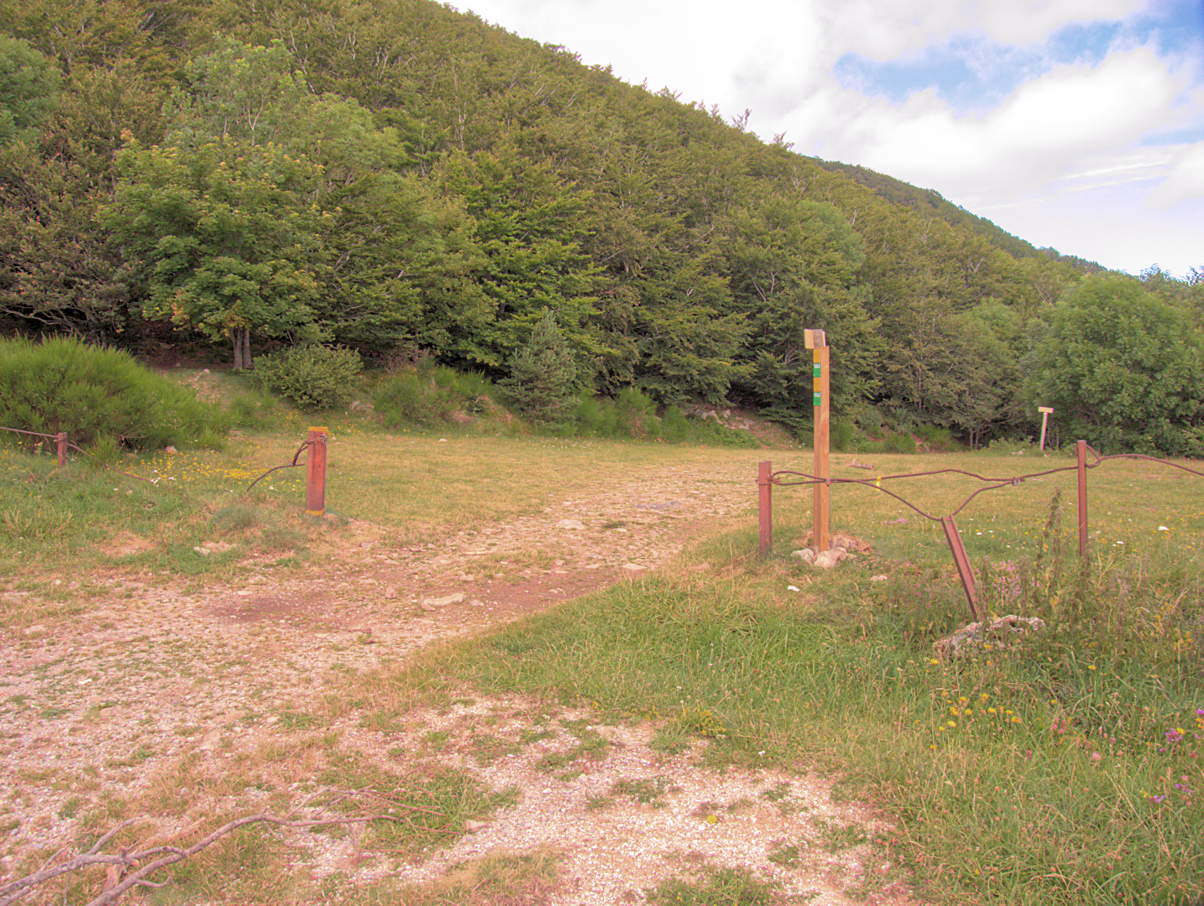 Frontière depuis l'Espagne au Col du Puits de la Neige, Maçanet de Cabrenys (Haut-Ampurdan, Gérone, Catalogne, Espagne), Céret (Pyrénées-Orientales, Languedoc-Roussillon, France)